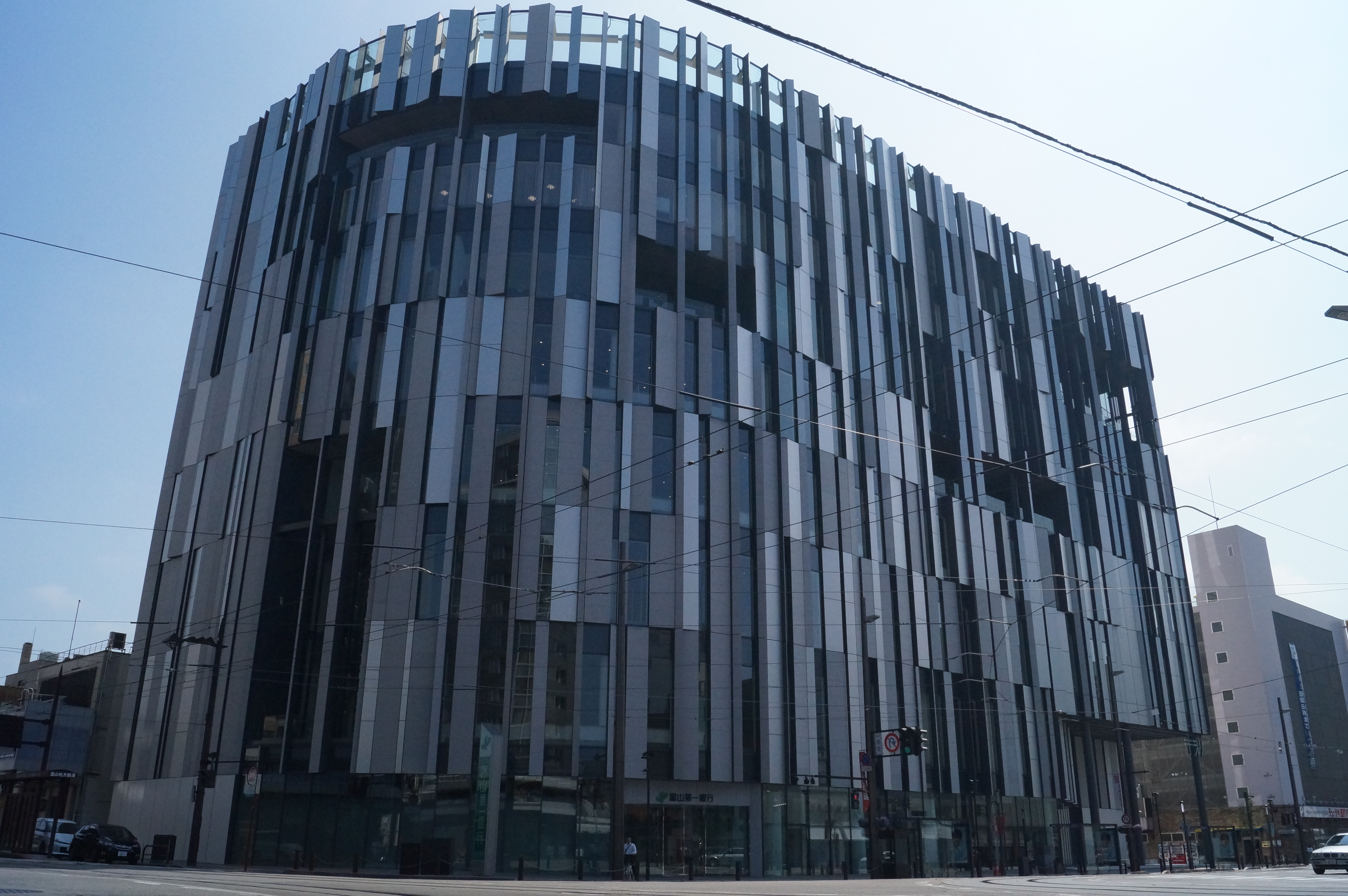 西町交差点より